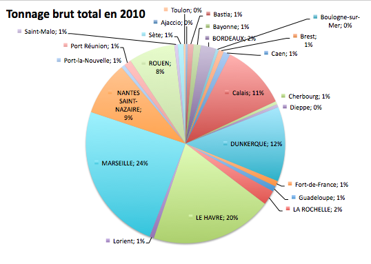 Trafic des ports de commerce français, selon le « tonnage brut total » pour 2010.